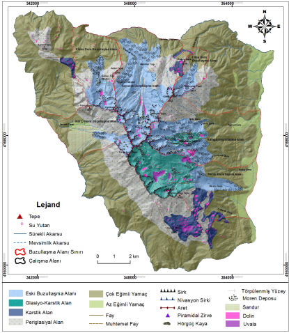 Dedegöl Dağı'nın buzul jeomorfoloji haritası